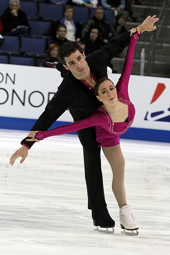 Mary Beth MARLEY and Rockne BRUBAKER at the 2011 Skate America